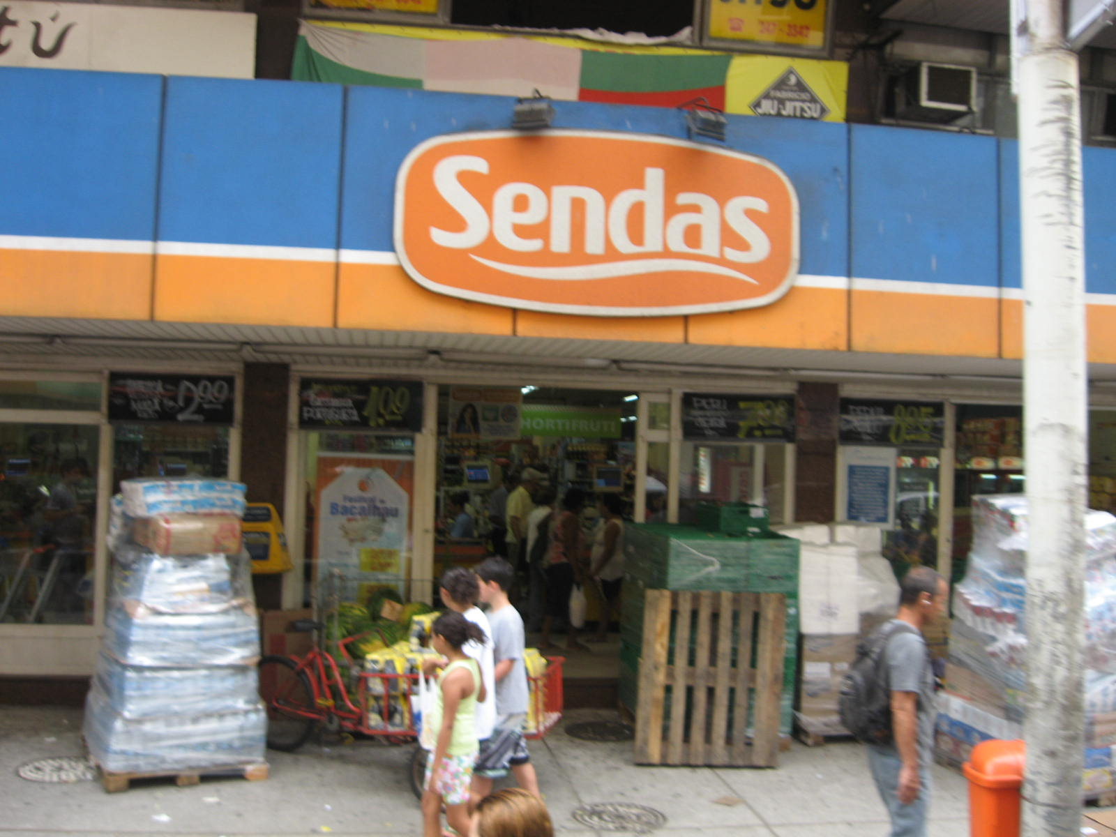 Vista do supermercado Sendas, em Copacabana, Rio de Janeiro, Brasil.